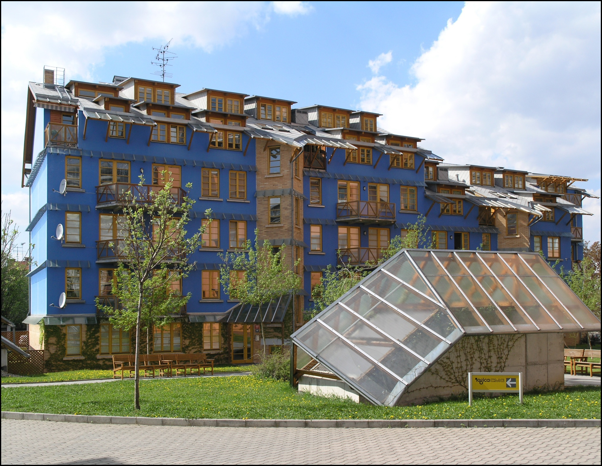 Praha-Veleslavín, areál Hvězda, architekt Vlado Milunić. Předvoje 449/30, z Pláničkovy. - OpenStreetMap (Info)